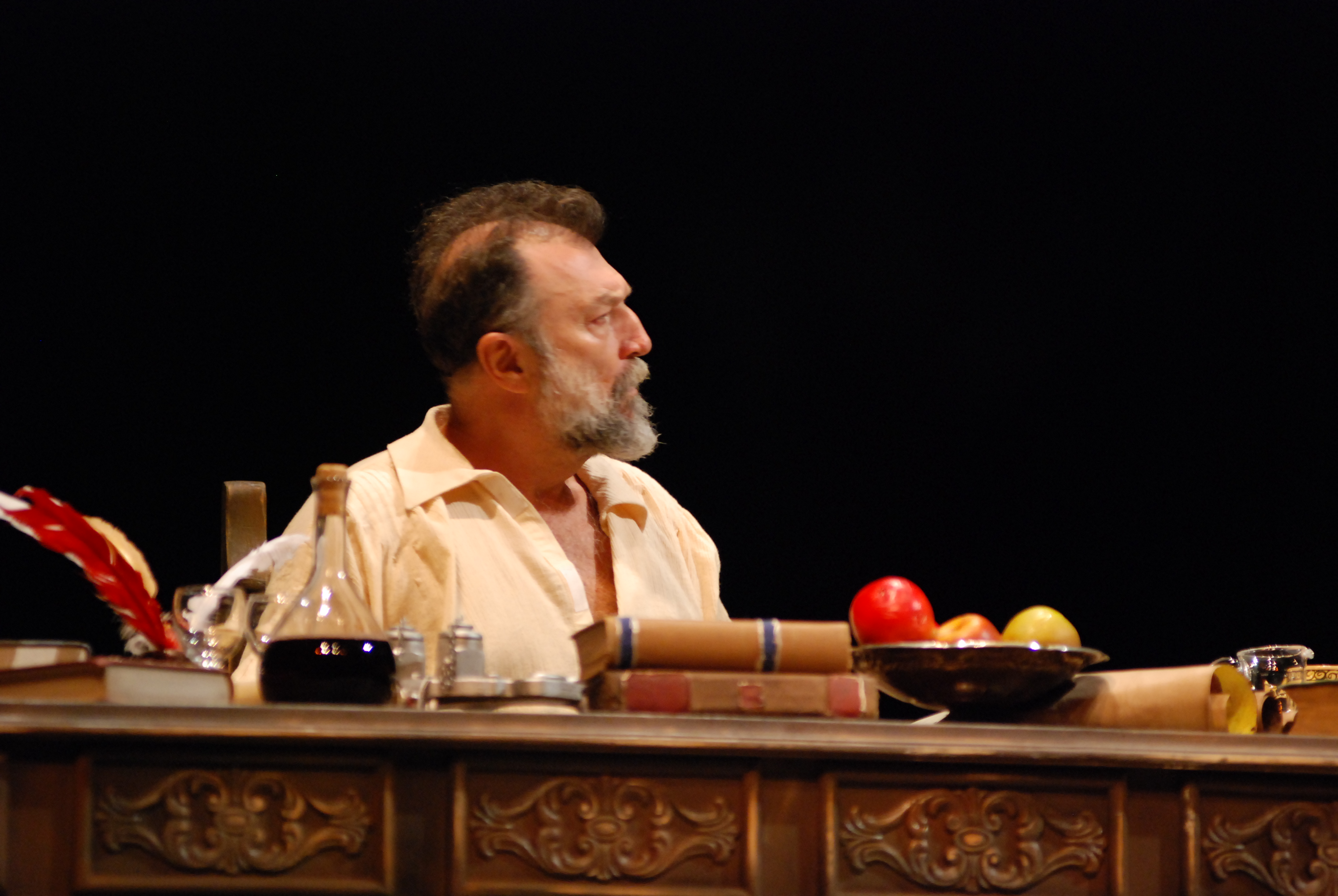 Erhan Gökgücü'nün yönettiği Brecht'in Galileo'nin Yaşamı oyunundan bir sahne